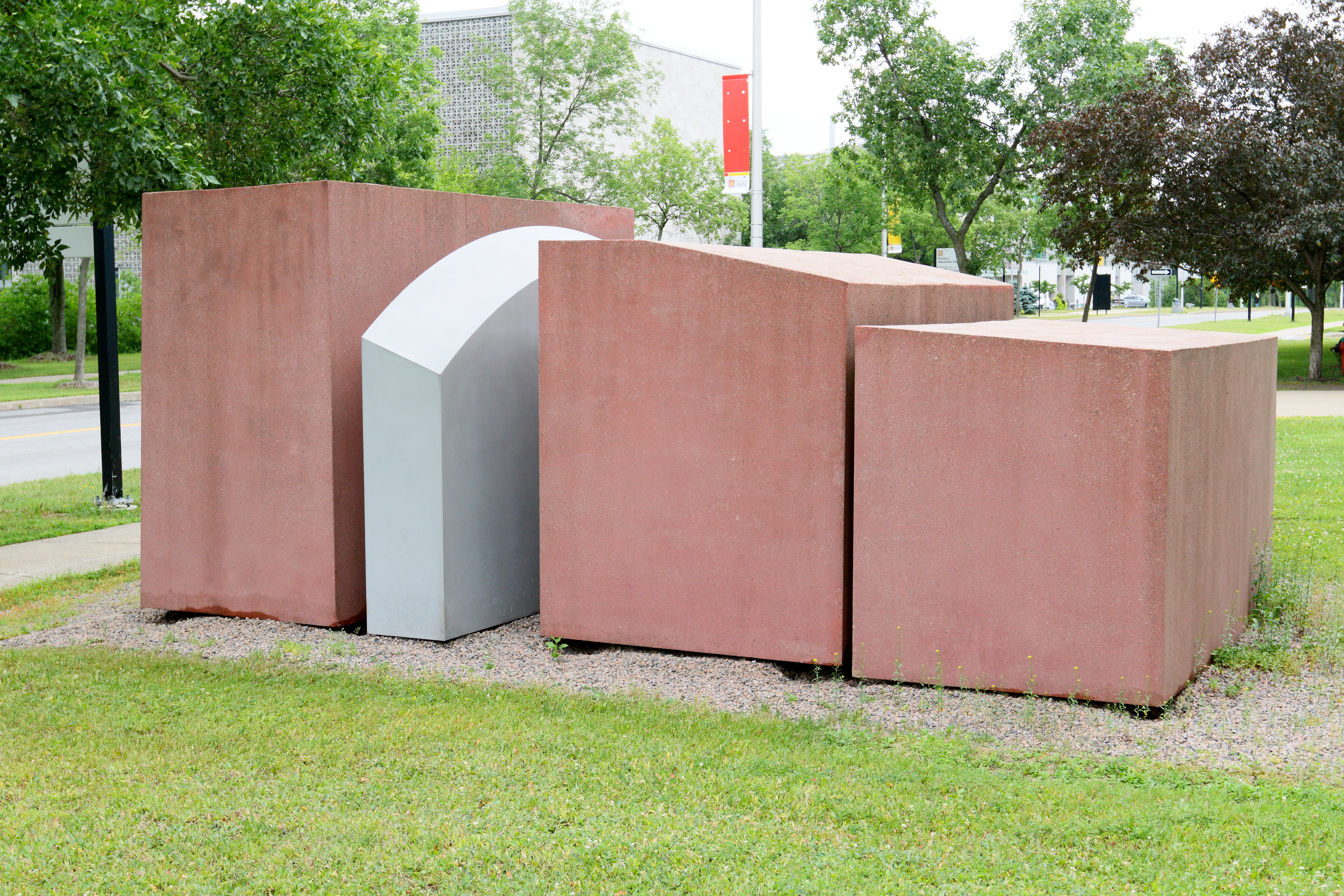 La sculpture, composée de quatre éléments, est abstraite. Sa densité, sa massivité et sa fluidité reprennent l'énoncé de base du pavillon Charles-Eugène-Marchand qui, dans un volume architectural compact, propose des zones de vacuité qualitatives. Son échelle et sa couleur réaffirment l'autonomie de l'oeuvre dont l'intégration ne se situe pas dans une littéralité formelle mais dans des rapports analogiques. Son image rappelle, de façon lointaine, une superposition de toitures et d'horizons, des interférences opérées par la couleur du temps sur les surfaces réfléchissantes.